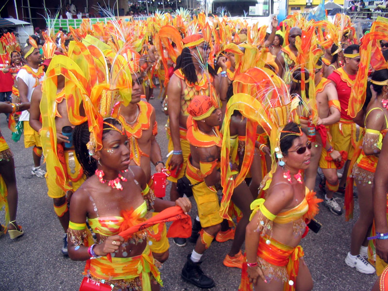 Carnival Masqueraders in Trinidad and Tobago